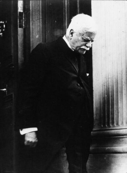 Alexandros Zaimis, presidente de la república griega, 1932.